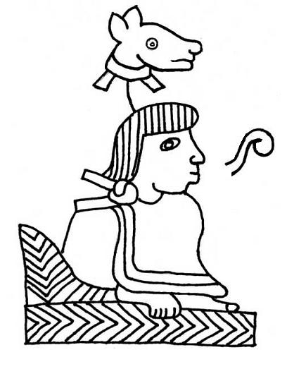 Imagen reprografiada del Códice Xolotl, lámina 10. Que representa a Nezahualcoyotl sentado en un trono (icpalli) y con su nombre pictográfico representado por la cabeza de un coyote.